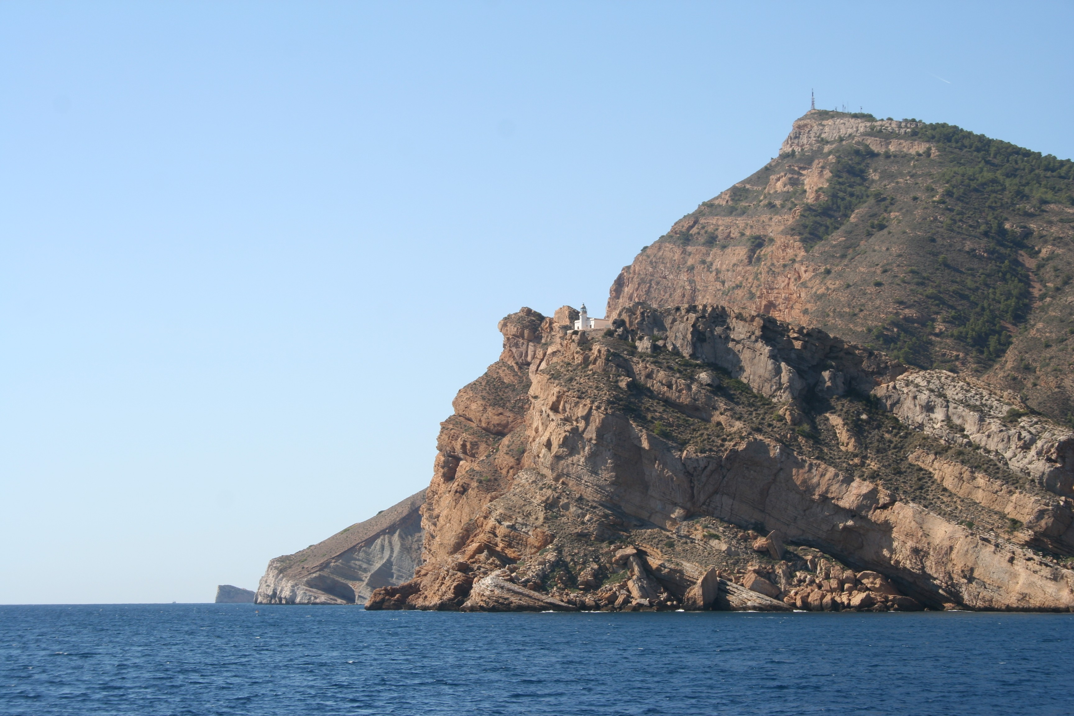 El faro del cabo del Estufador visto desde el mar, en Altea (Alicante, España)